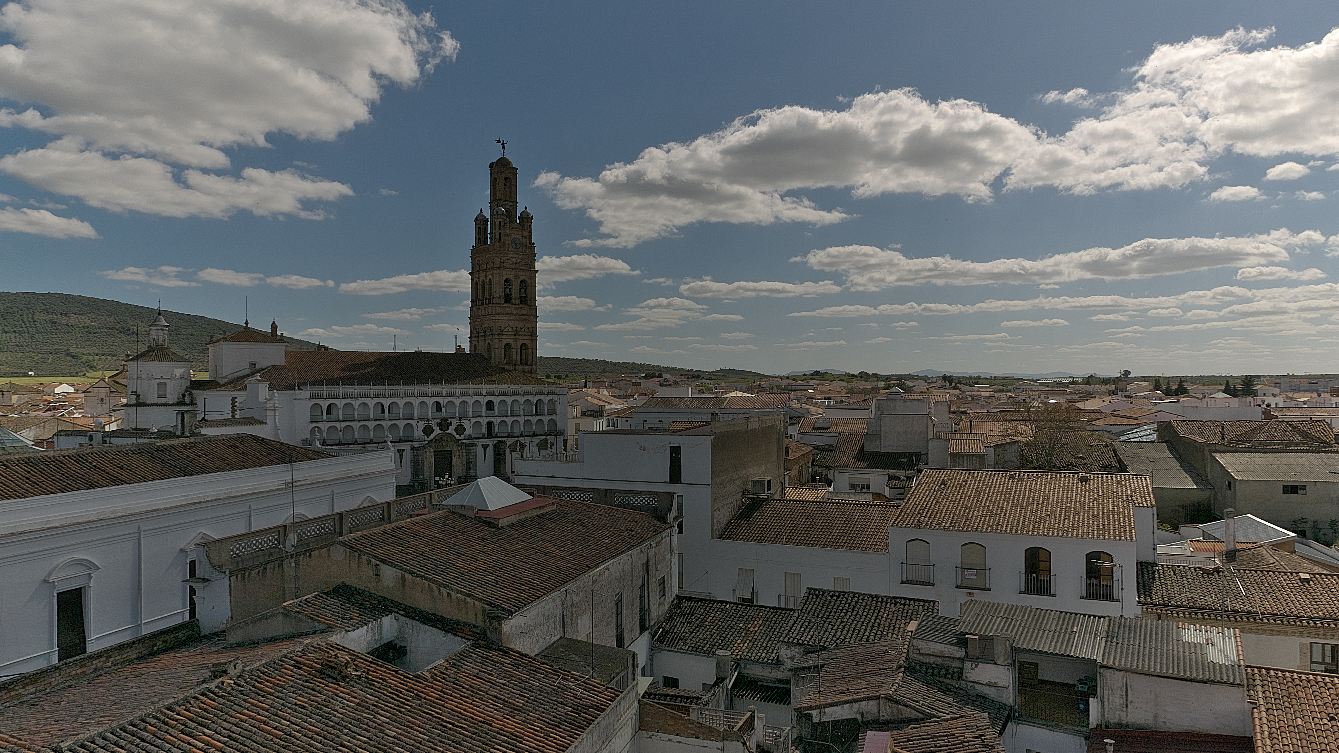 Vista de Llerena y su iglesia y campanario de Nuestra Señora de la Granada.